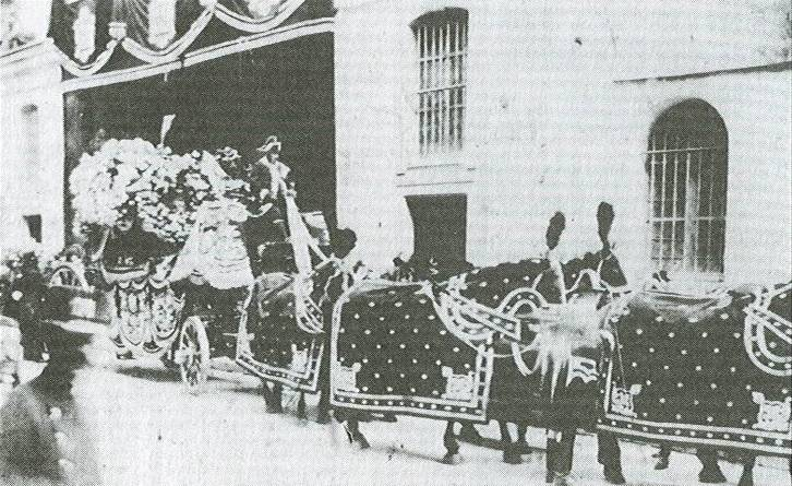 Burial of Guzmán Blanco, 1899